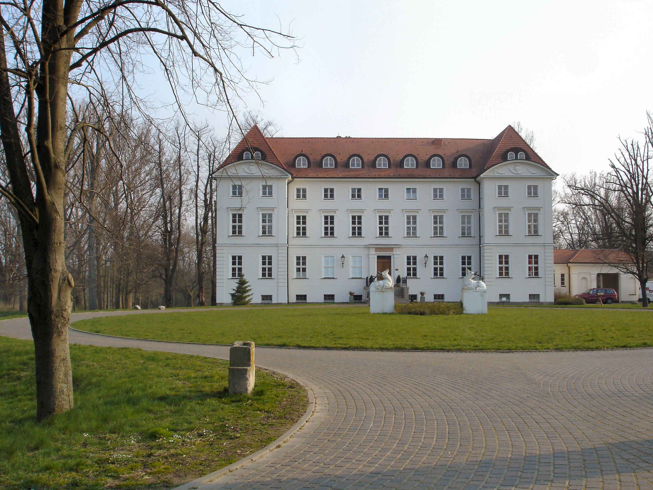 Schloss in Wedendorf / Castle in Wedendorf (Mecklenburg-Western Pomerania)